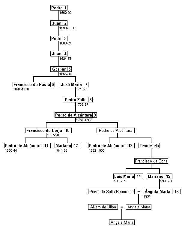 Árbol genealógico de los duques de Osuna